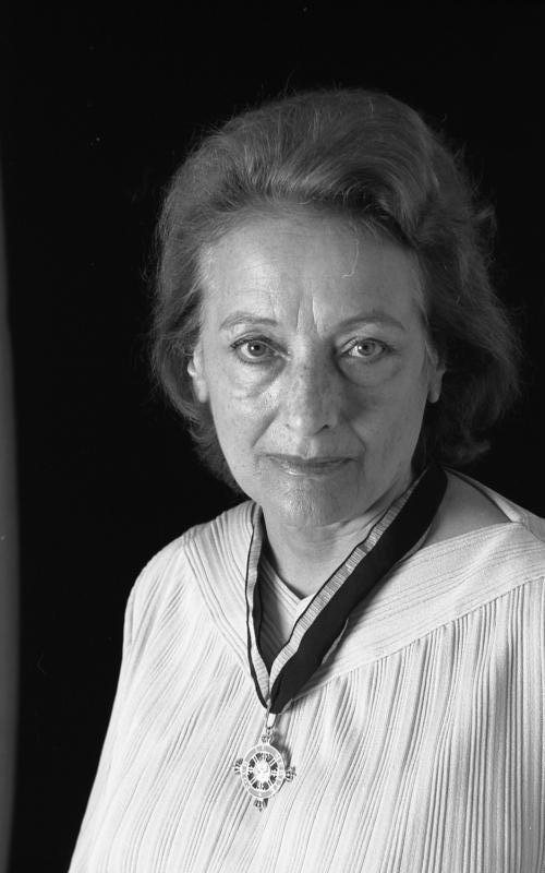 Frau Maria Wimmer, Mitglied des Ordens Pour le merité für Wissenschaften und Künste.